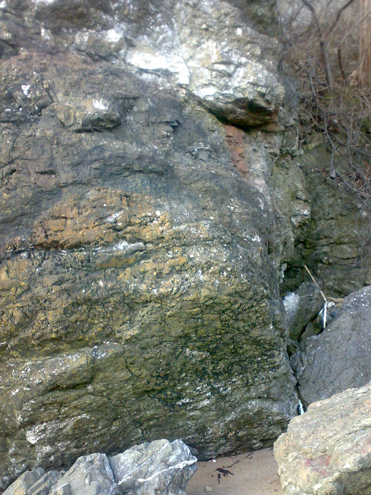 Hornfels and marmor in Ersvika, Hurum, Norway